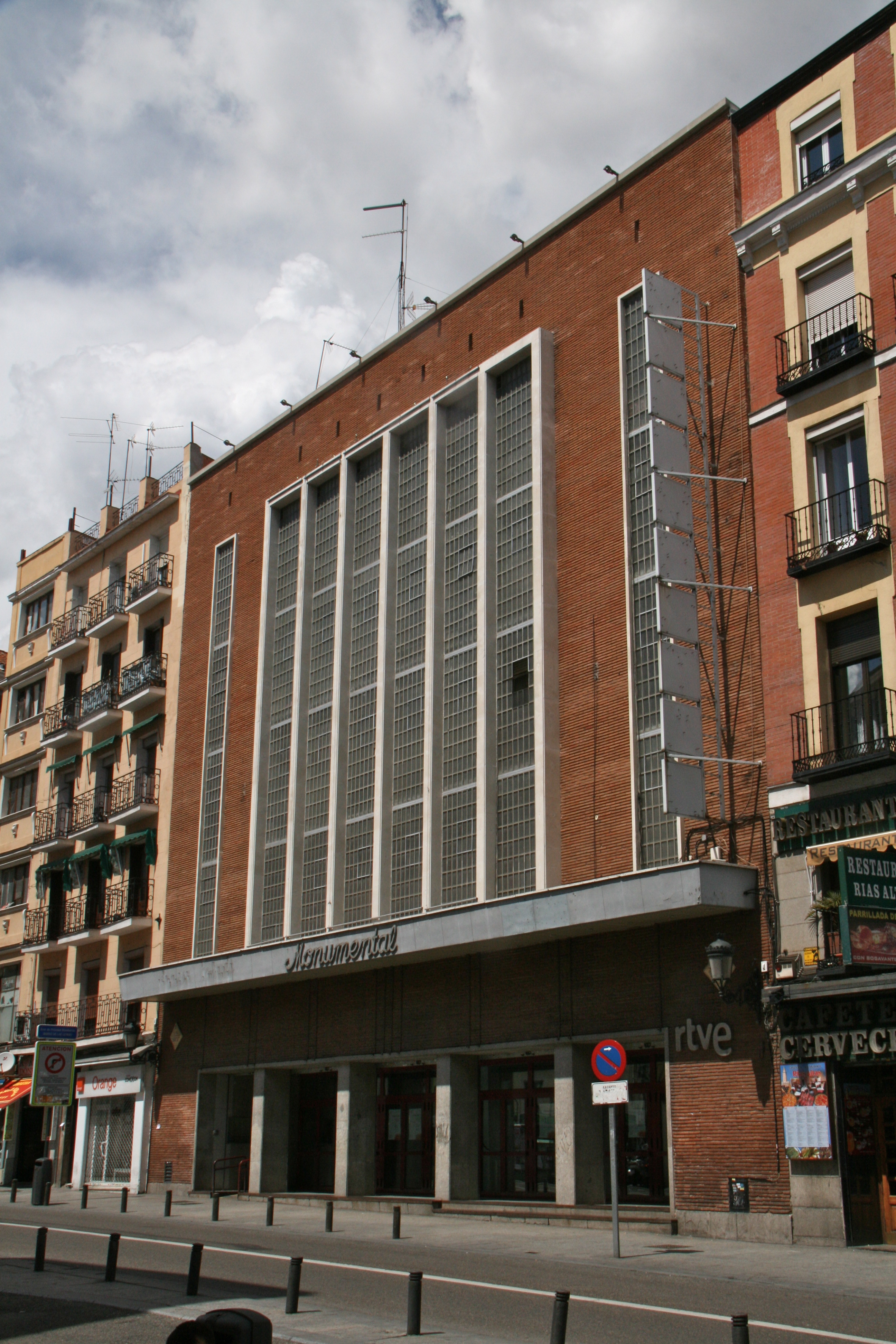 Monumental Cinema